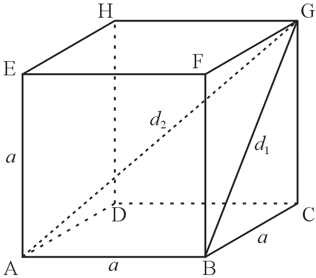 Author: Michael Angelkovich